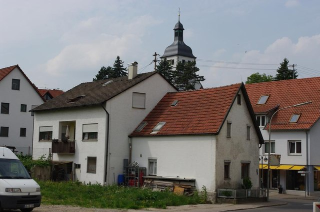 Erdmannhausen